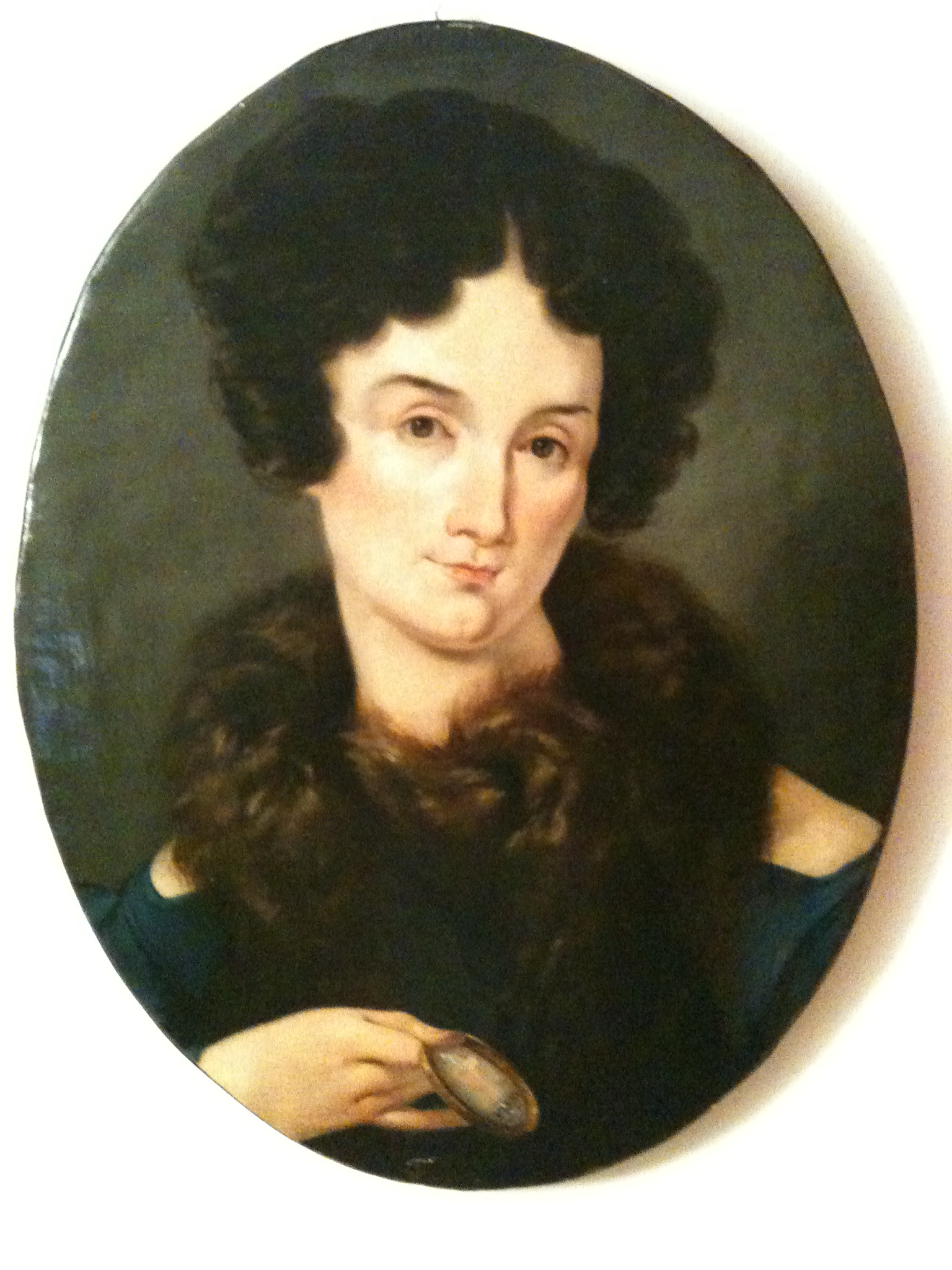 Angiola Brignole Trissino dal Vello d'Oro (1802 – 1830). Olio su tela. Collezione privata